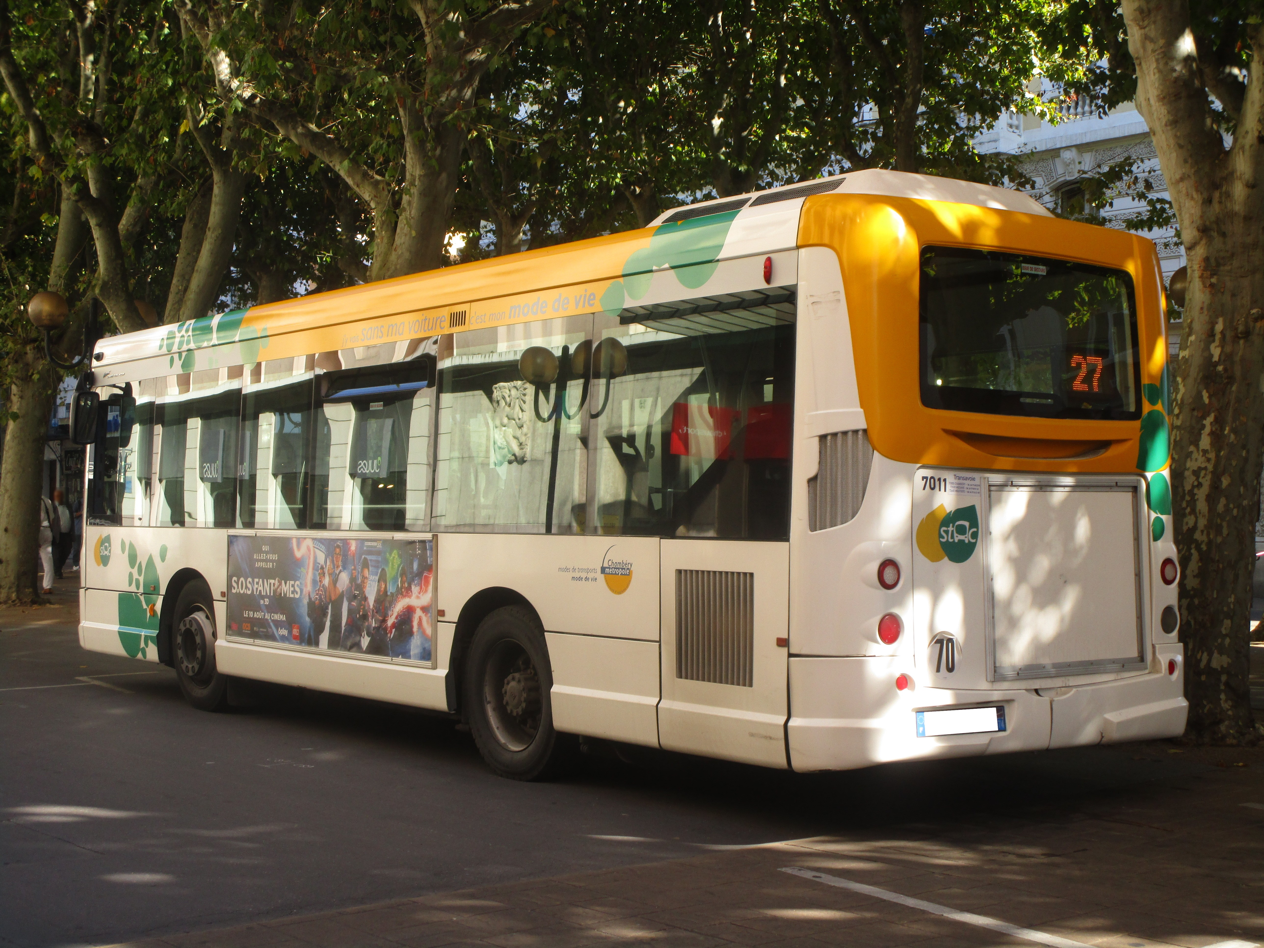 The bus Heuliez GX 127 n°7011 of the STAC, on the line 27 (Éléphants, Chambéry↔De Gaulle, La Motte-Servolex), at the exchange terminal Éléphants in Chambéry on August 24, 2016.